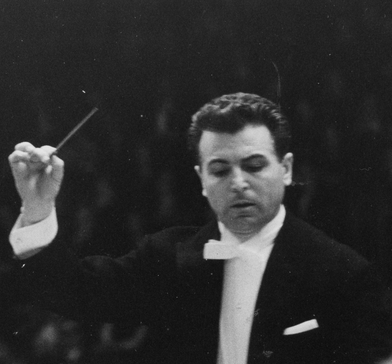 Giulio Bertola nel 1970